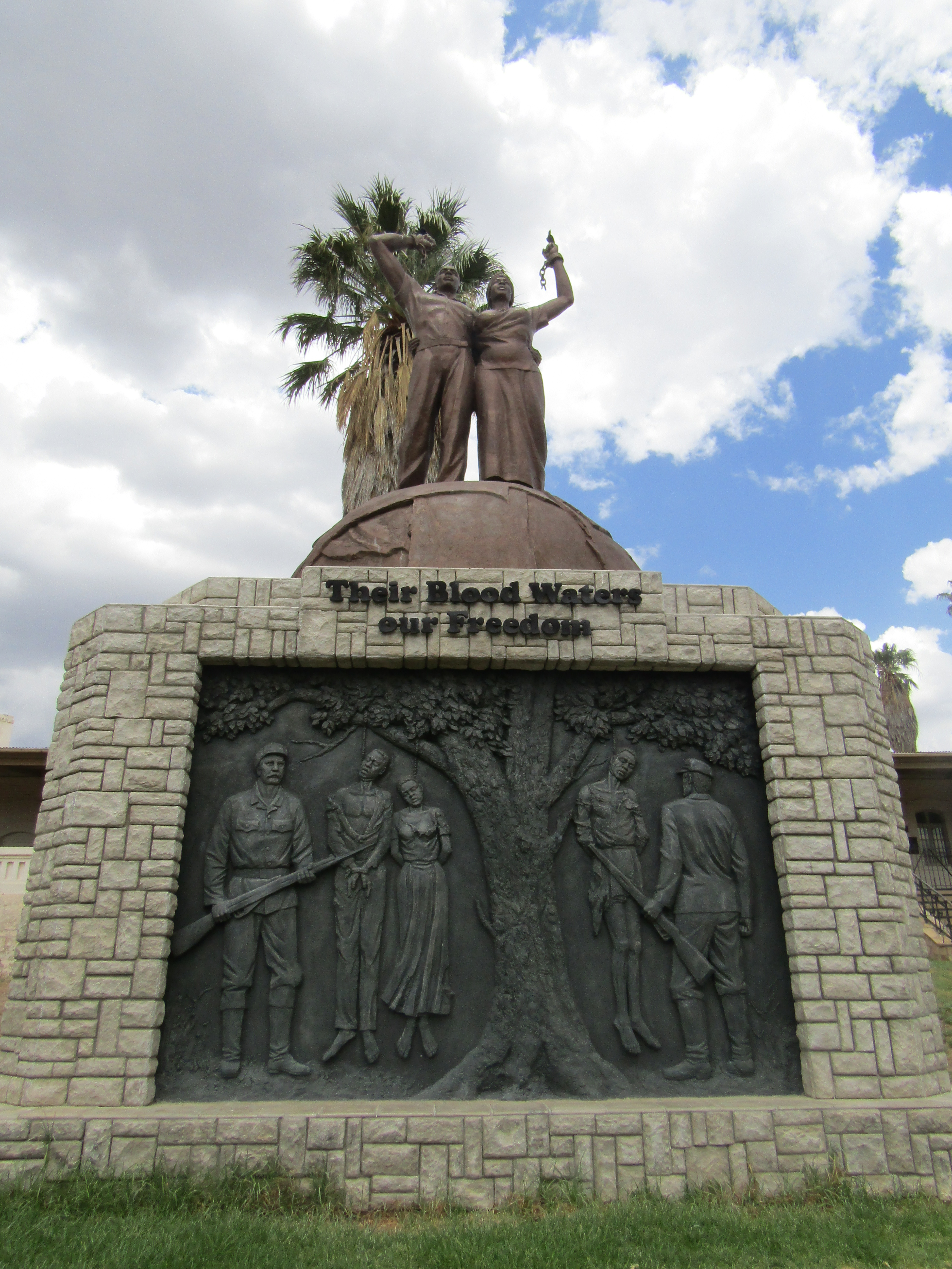 Genozid-Denkmal vor der Alten Feste in Windhoek